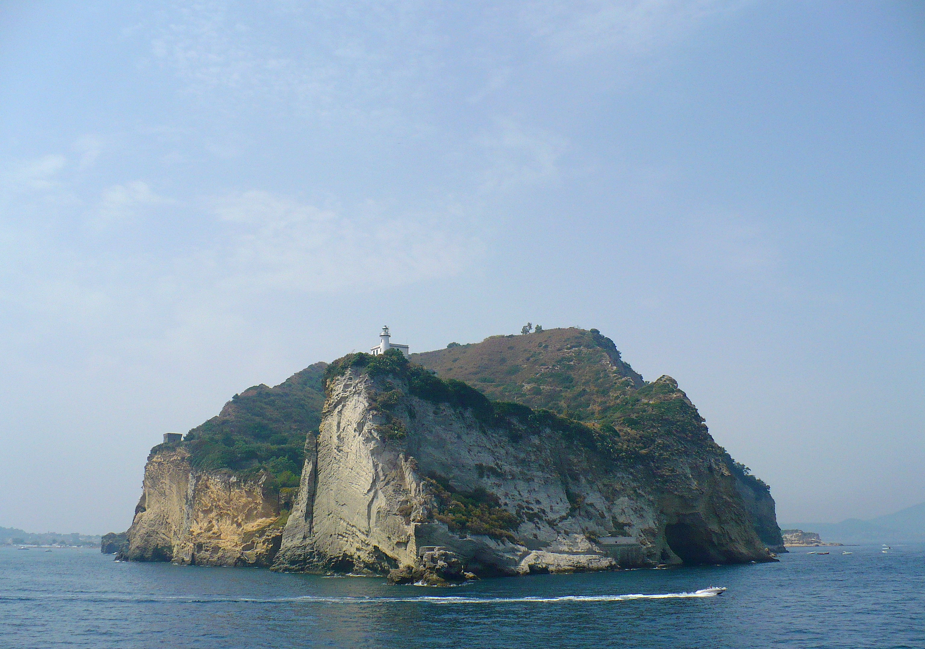 Veduta frontale del promontorio di Capo Miseno. Autore foto: Roberto De Martino